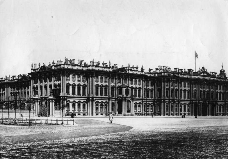 St. Petersburg, Winterpalais Scherl Bilderdienst Petersburg, Russland: Der Winterpalast. (Leningrad) 3662-06